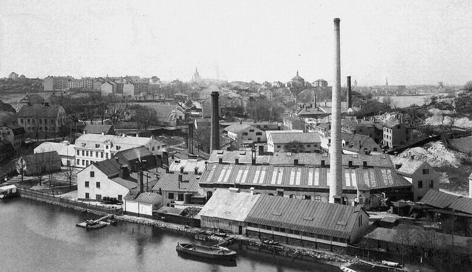 Liljeholmens stearinfabrik och Hovings malmgård (längs till vänster) 1890-tal